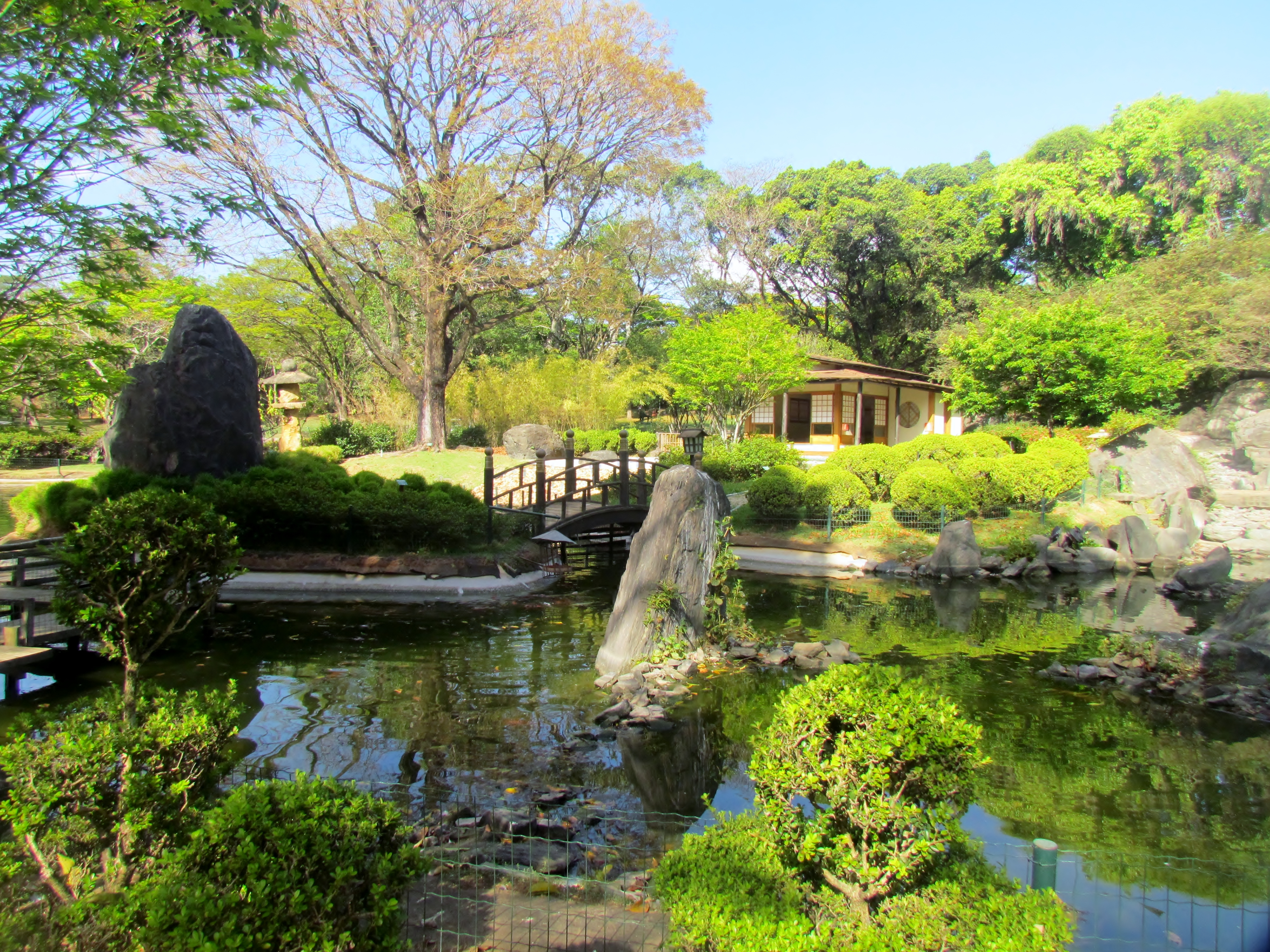 Jardim Japonês no Jardim Botânico de Belo Horizonte, Minas Gerais.